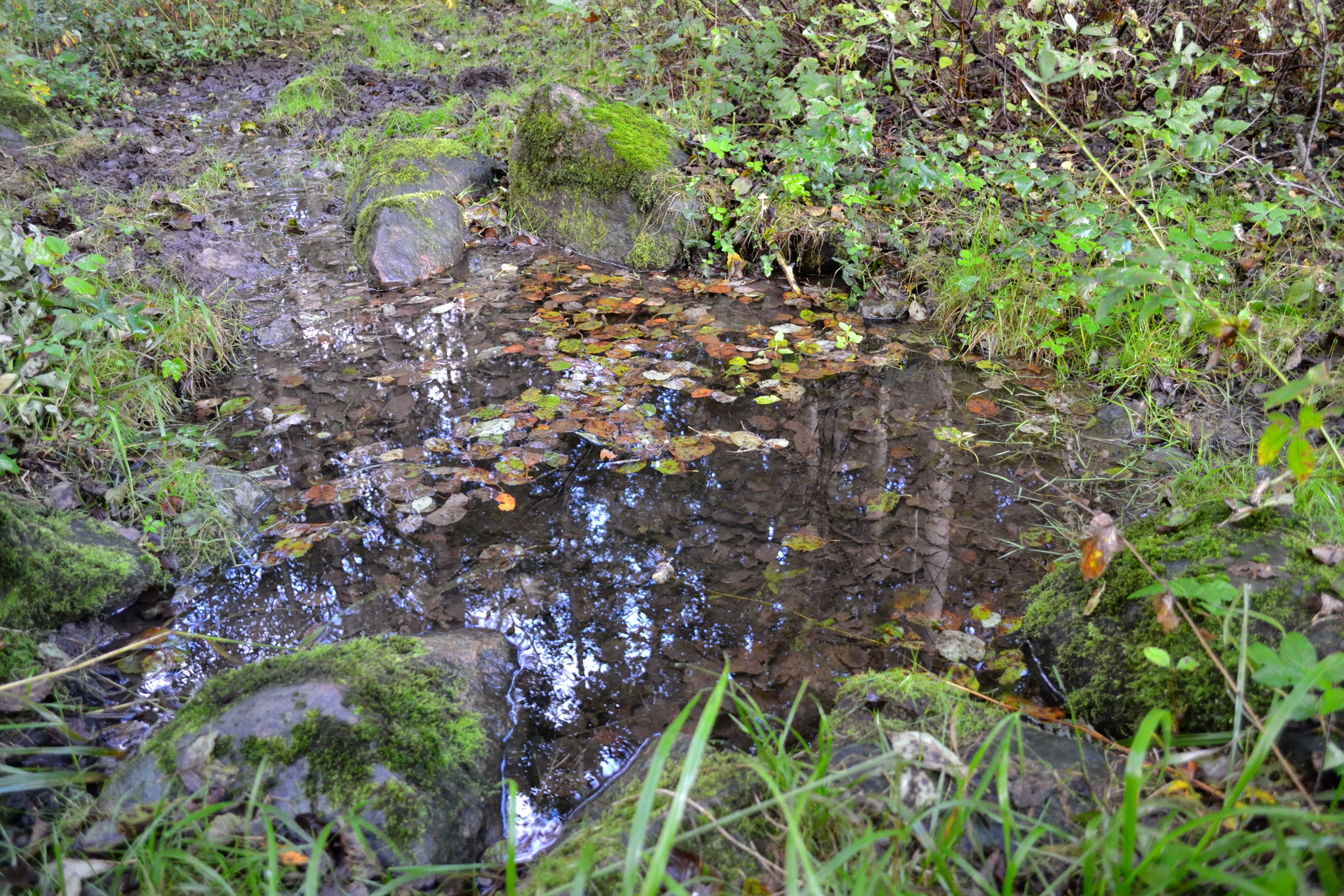 Ohvriallikas "Sõeru allikas" Aadress: Harju maakond, Saue vald, Vanamõisa küla Kubjamõisa